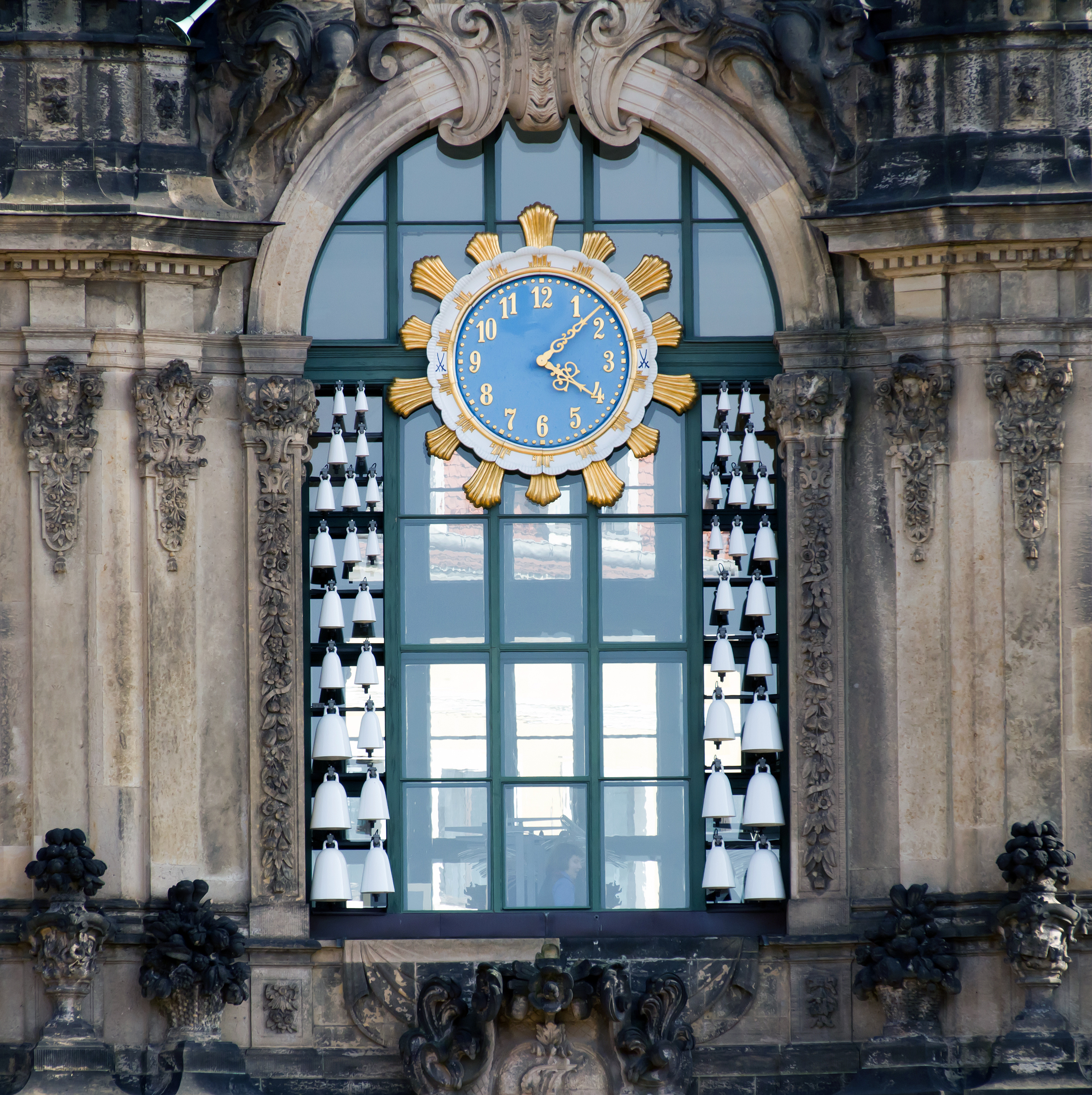 Glockenspiel des Dresdner Zwingers